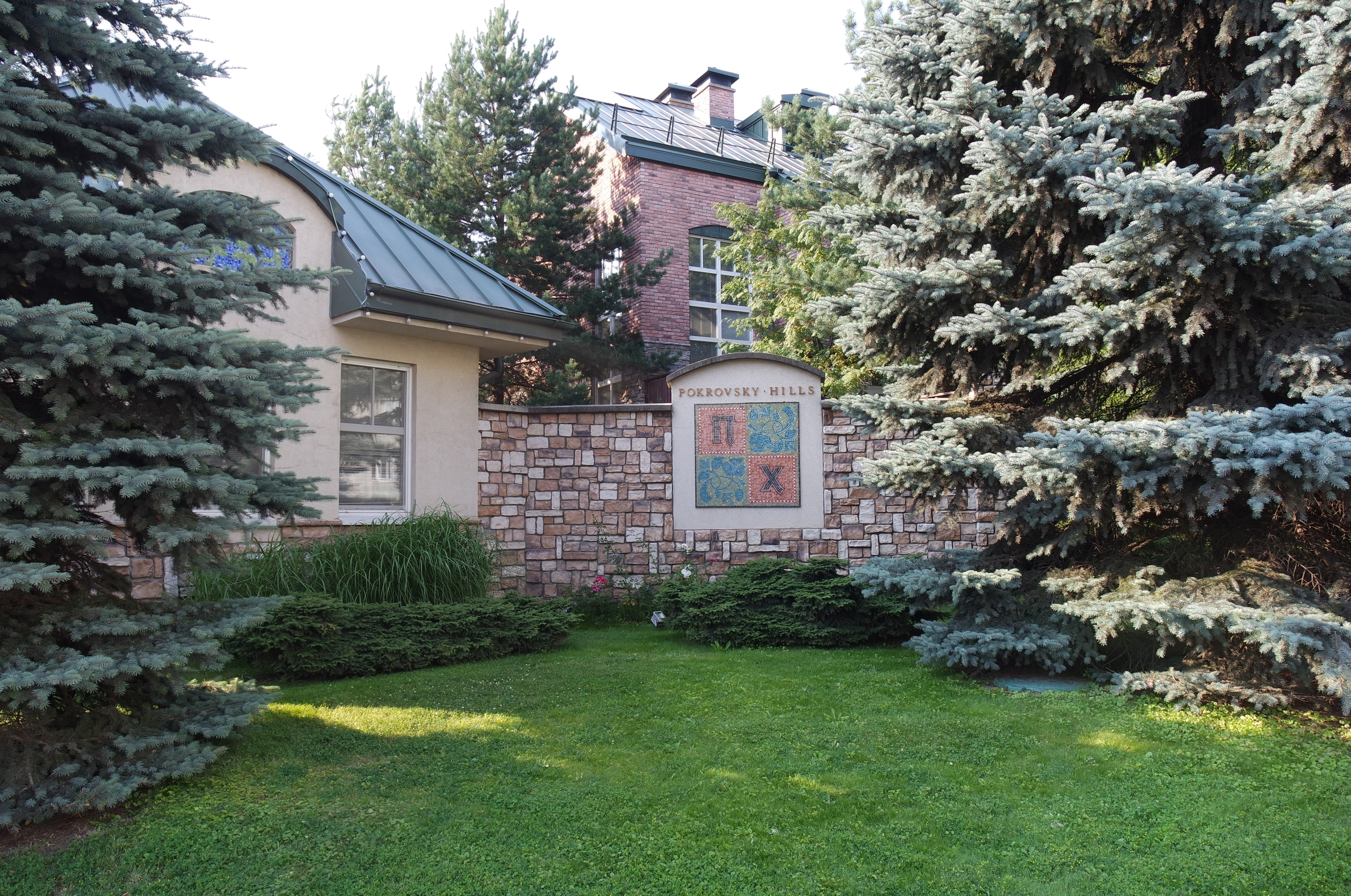 Проходная посёлка «Покровские холмы»